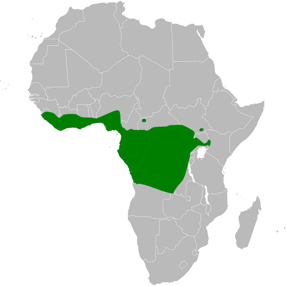 Baeopogon distribution map